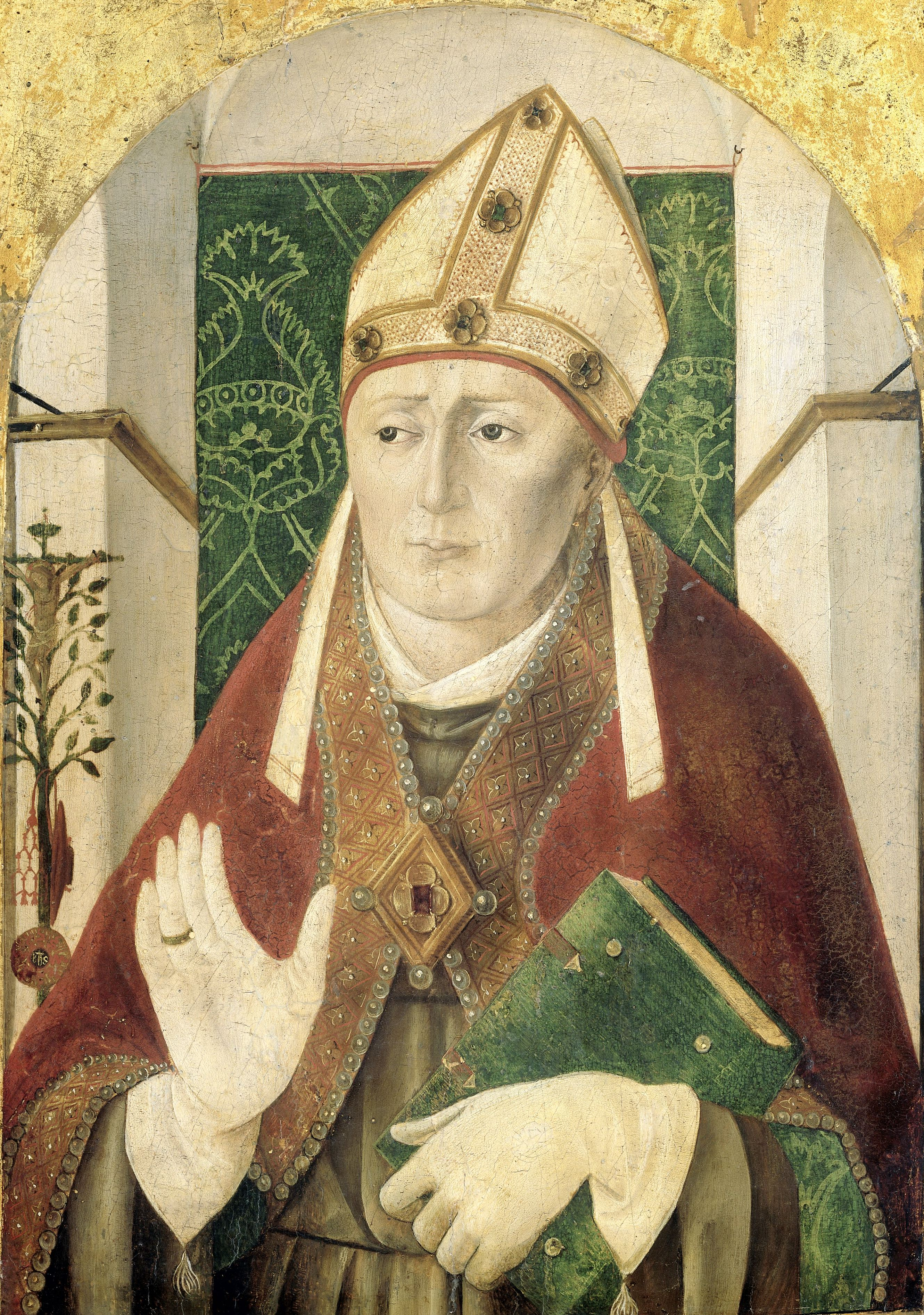 De heilige Bonaventura. Halffiguur met boek in de linkerhand en opgestoken rechterhand.